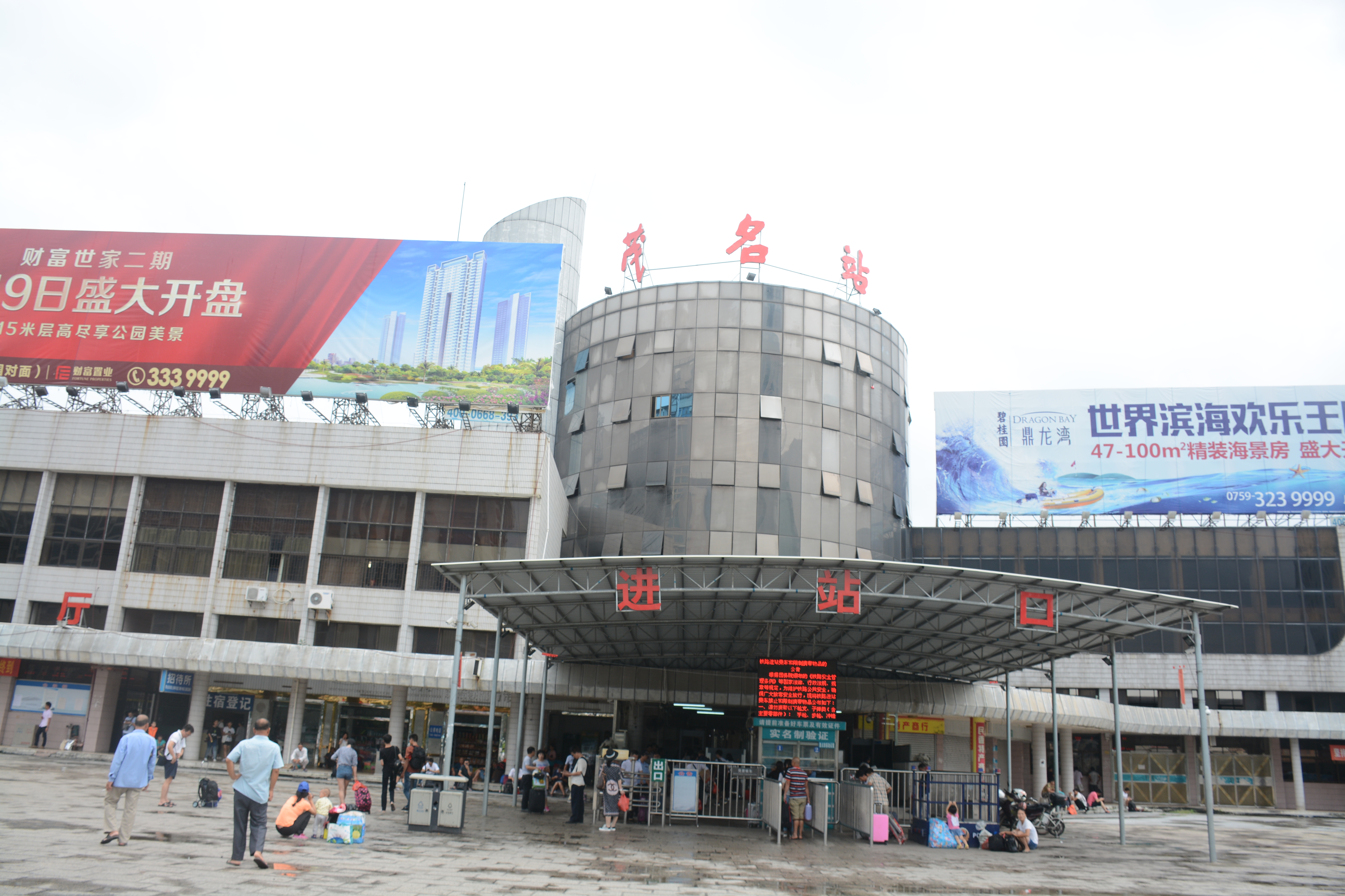 2016年9月10日改名后的茂名站